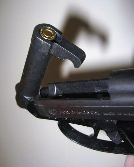 Beretta Model 21a-.25 Cal. (Tip-Up, Barel)